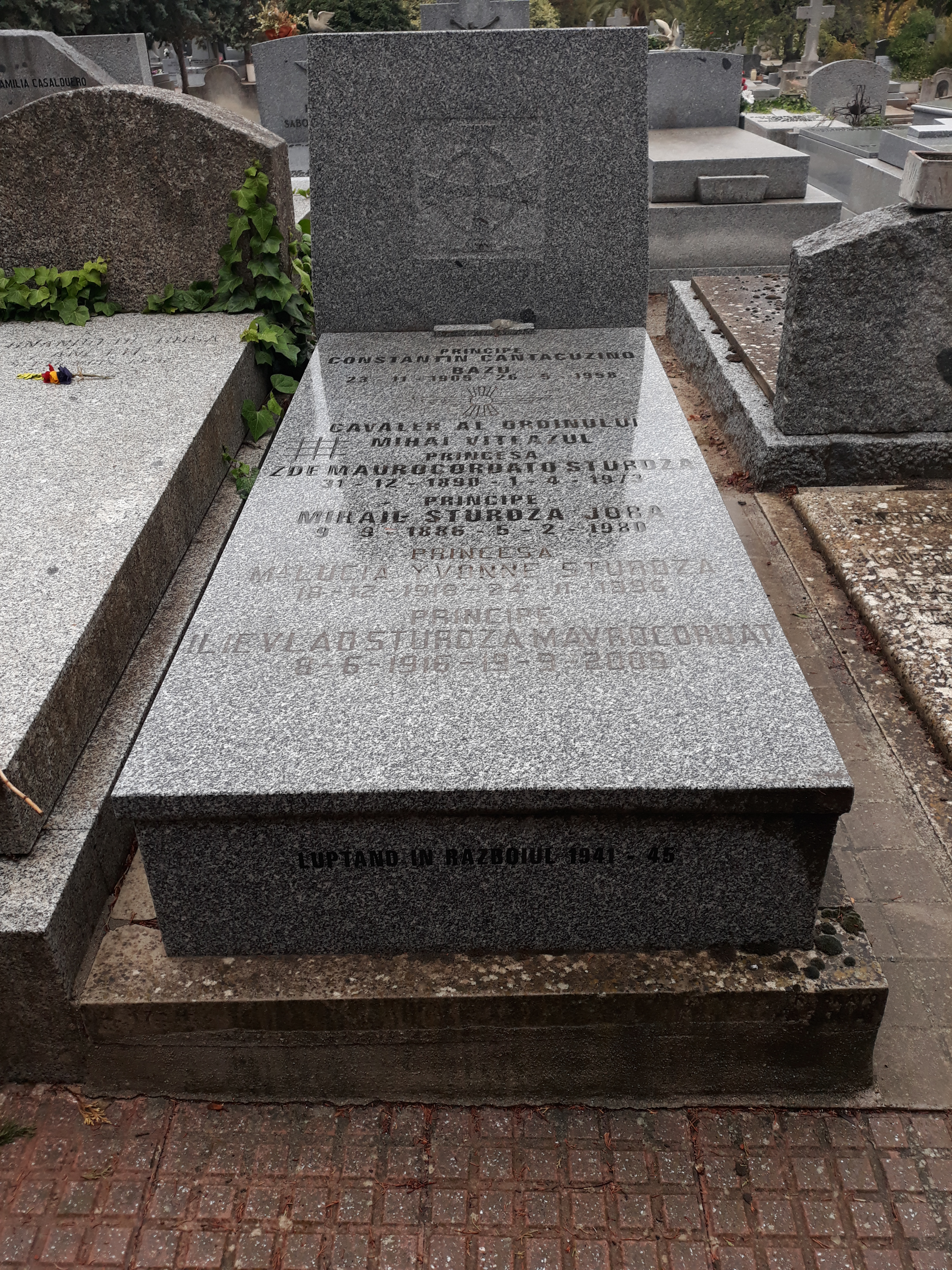 Das Grab des rumänischen Piloten Constantin Cantacuzino auf dem Cementerio civil de Madrid.